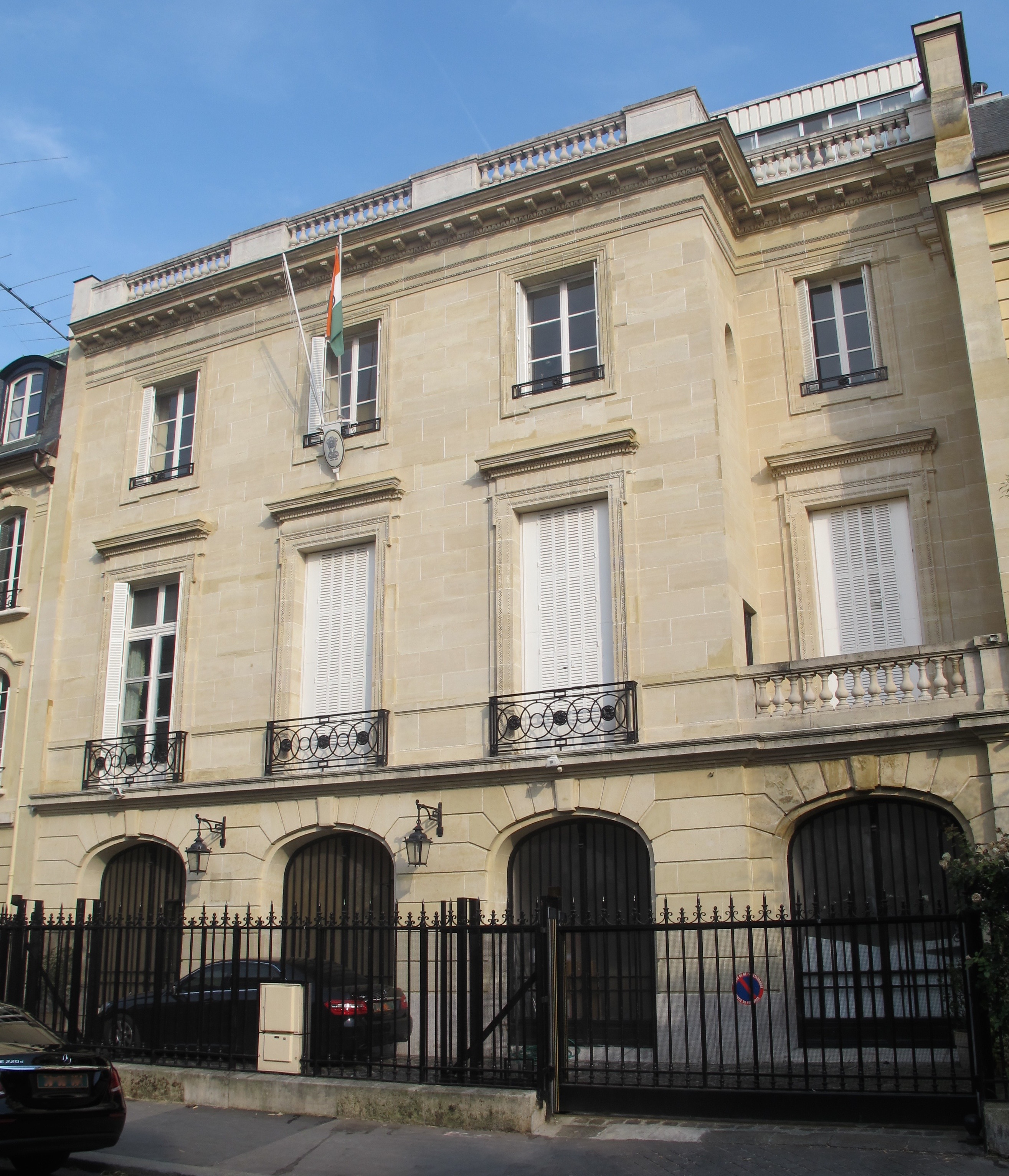 Ambassade d'Inde en France, n°13-15 rue Alfred Dehodencq (Paris, 16e).